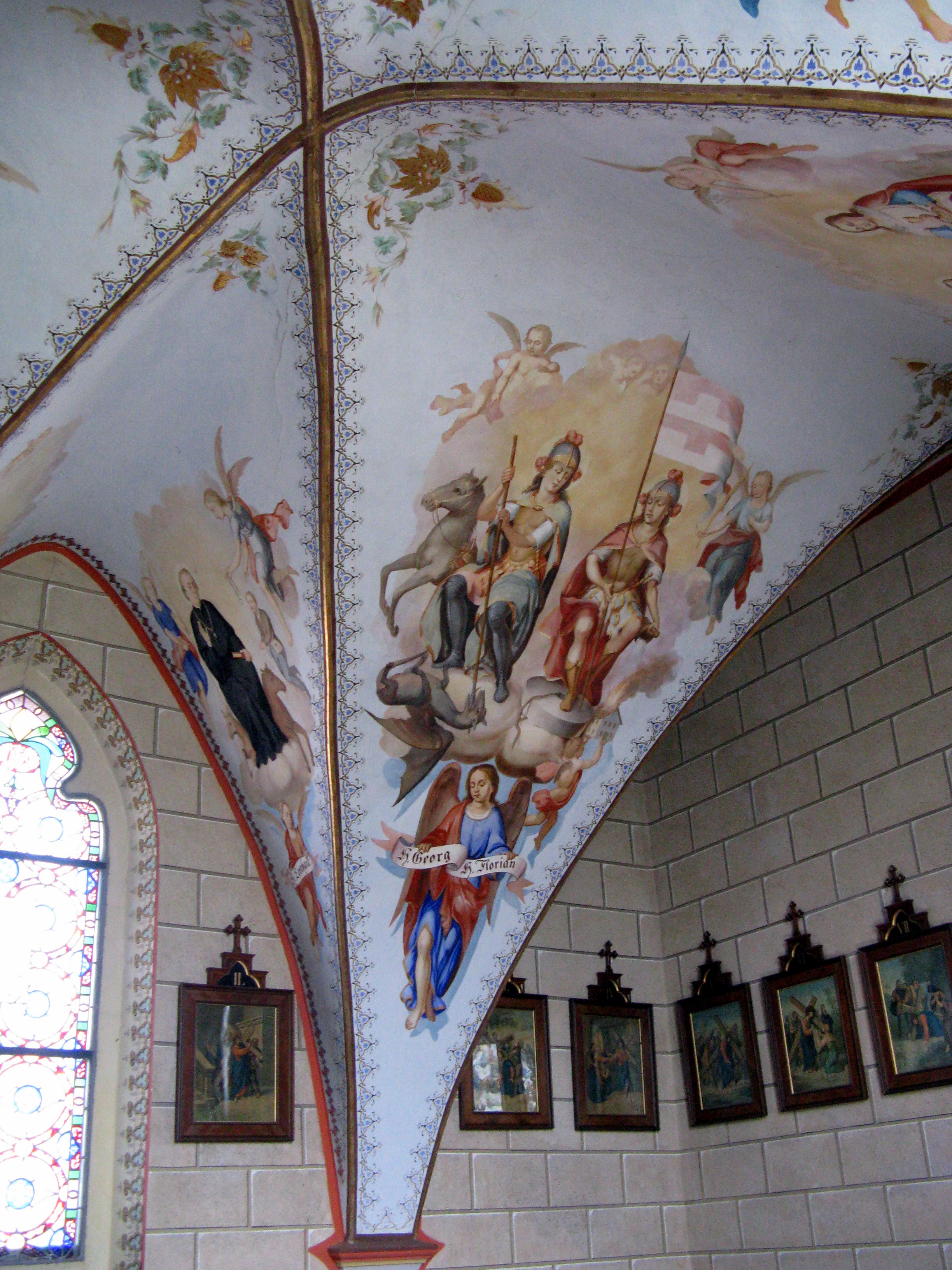 Kapelle Aisthofen Innenraum